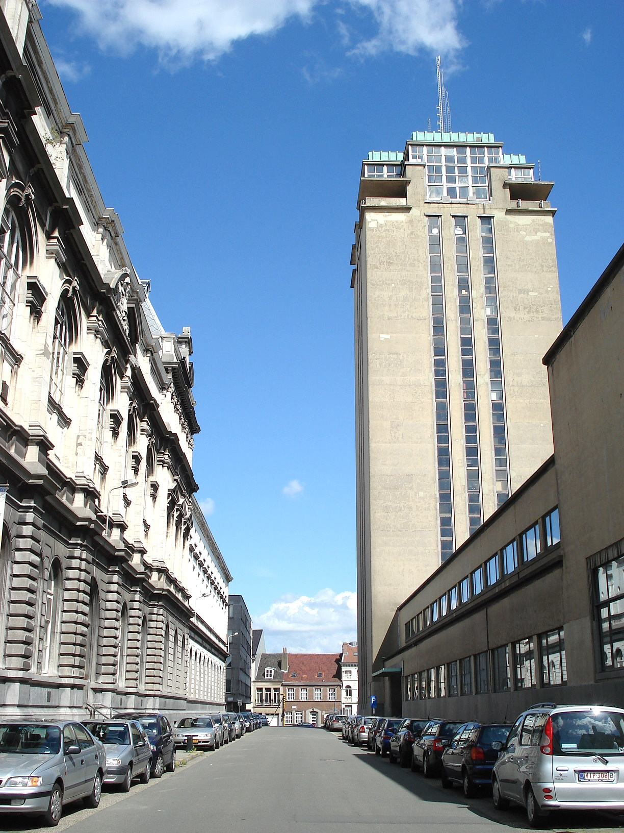 Bibliothèque universitaire de Gand (Belgique), réalisation d'Henry Van de Velde.